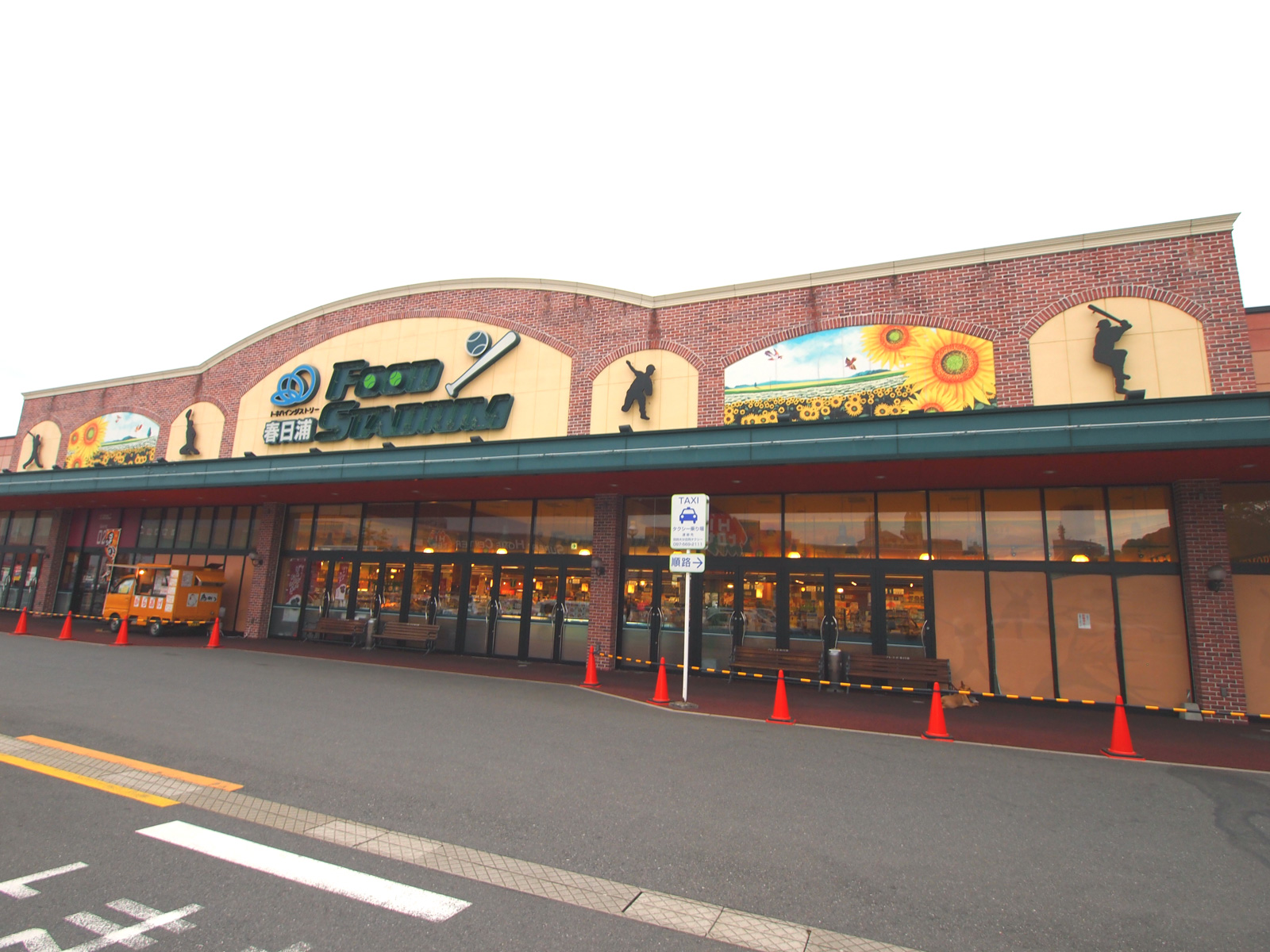 トキハインダストリー春日浦フードスタジアム（大分県大分市）